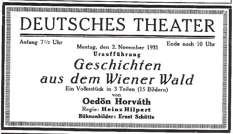 Geschichten aus dem Wiener Wald von Ödön von Horvath. Programmzettel der Uraufführung 1931